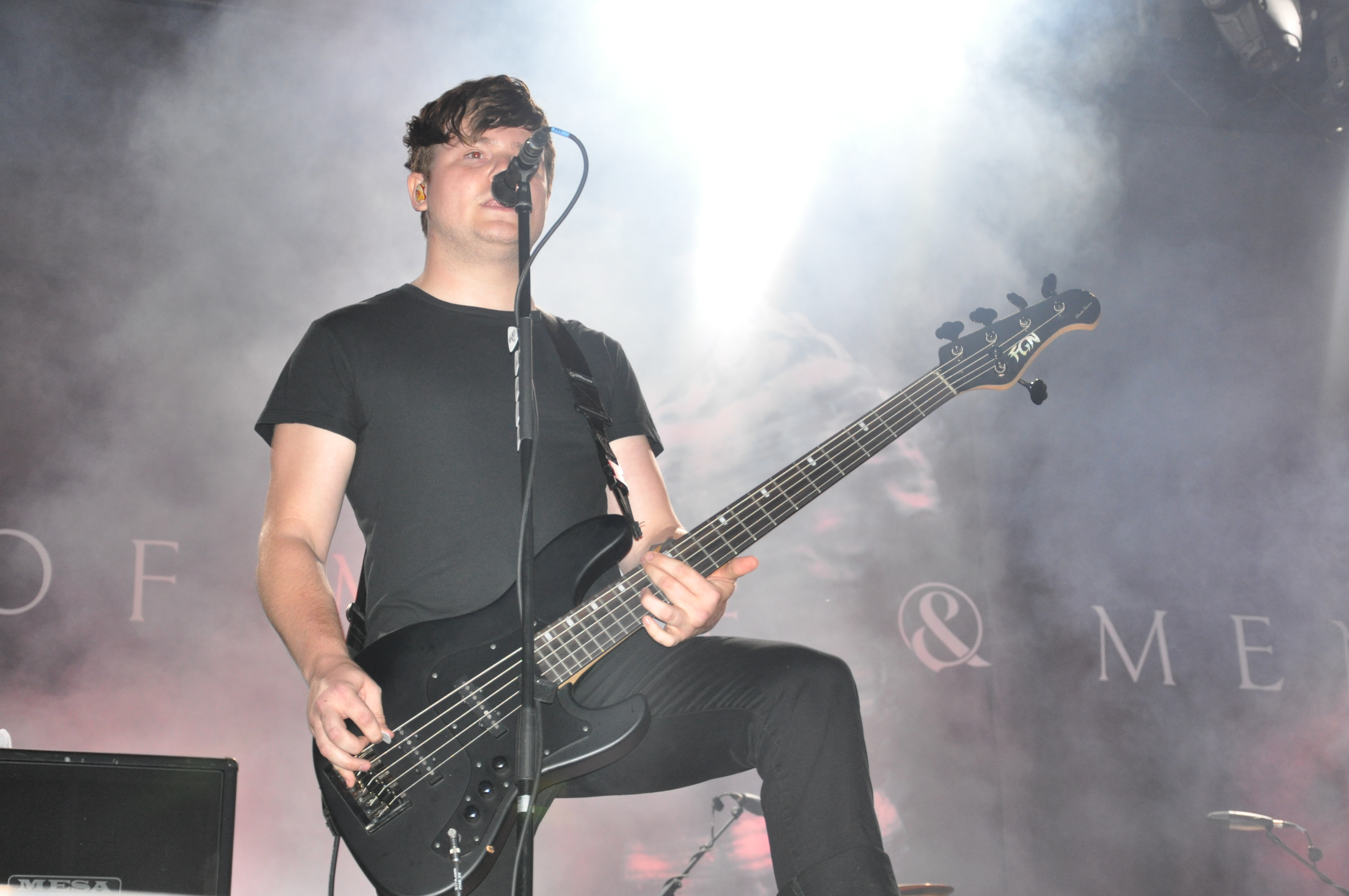 Of Mice & Men auf der Clubstage bei Rock am Ring 2014